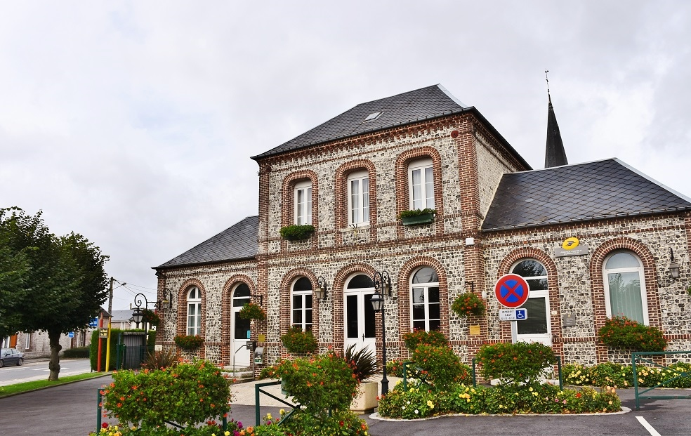 La Mairie